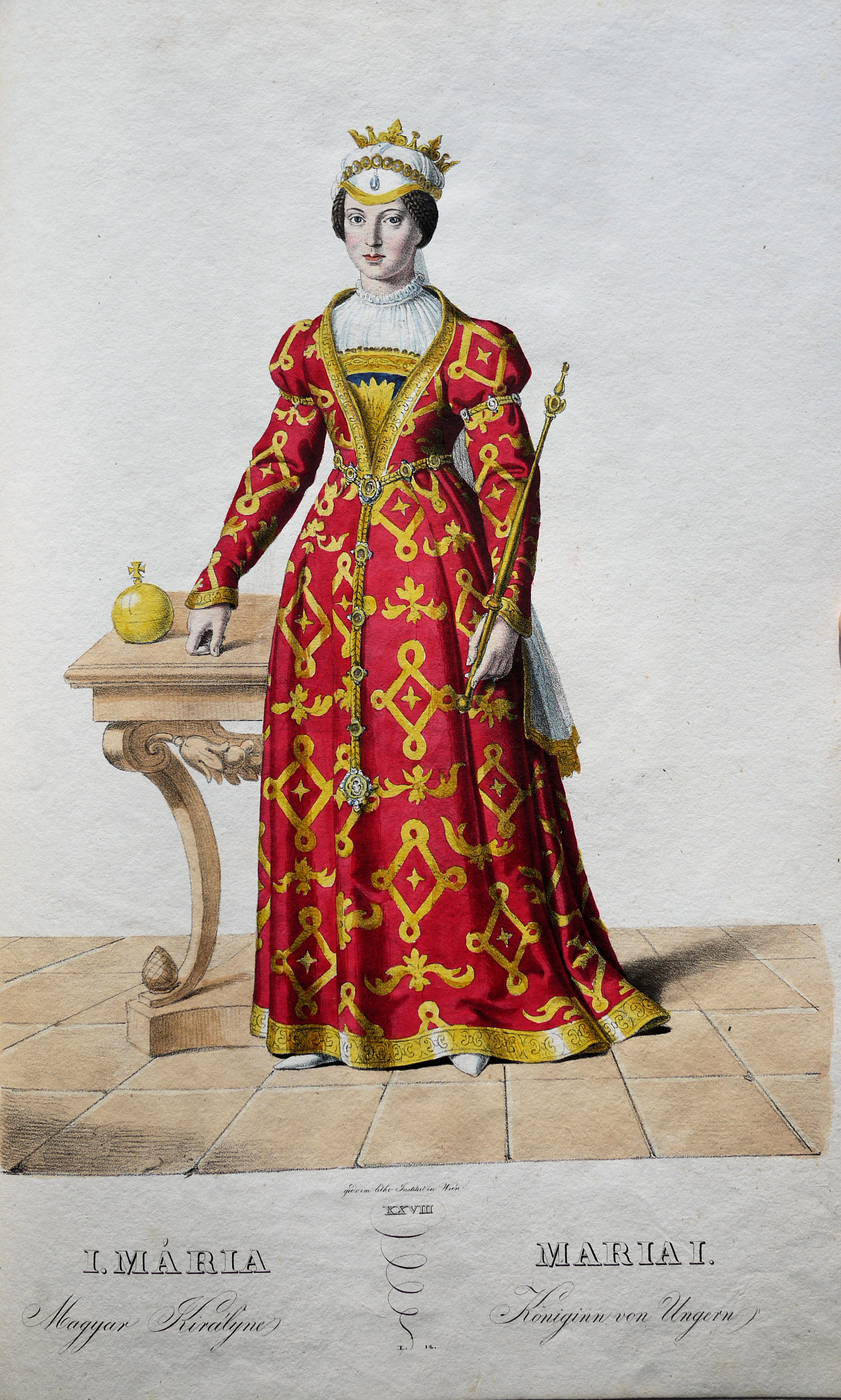 Maria I. (1370-1395), Königin von Ungarn etc. Lithographie von Josef Kriehuber nach einer Zeichnung von Moritz von Schwind aus Ungerns Erste Heerführer Herzoge und Koenige In einer Reihe von Bildnissen von Bela bis auf Seine Majestät Franz I. Kaiser Von Österreich König Von Ungern &c., &c. Wien : Lithographisches Institut ;ca. 1828